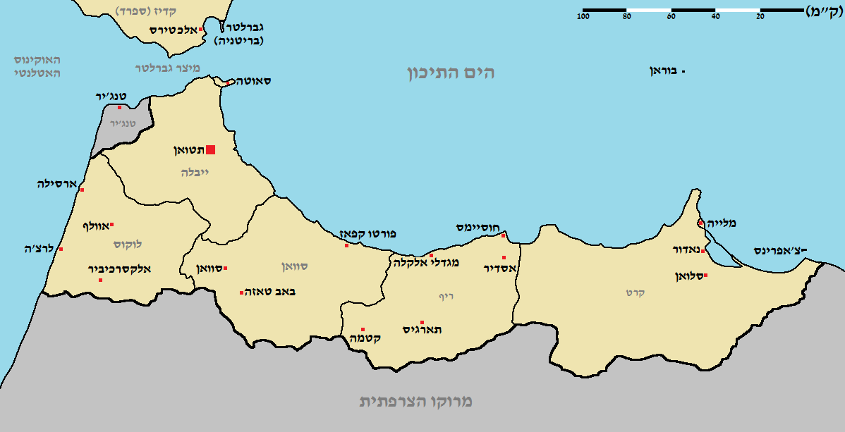 מפה של המושבה הספרדתית במרוקו